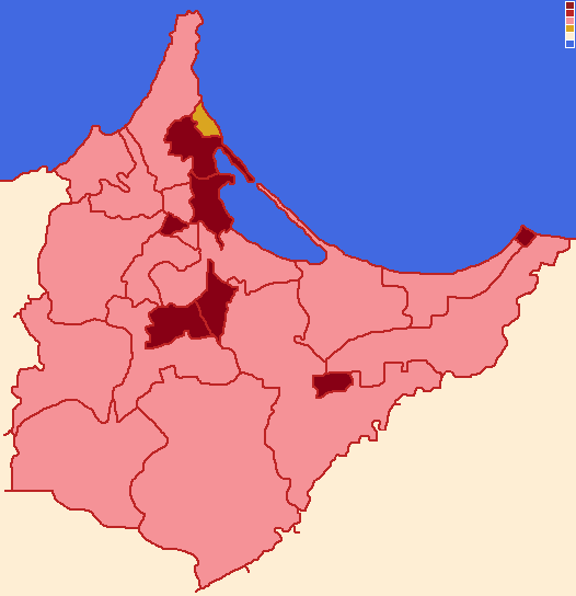 Subdivisões da província de Nador, entre divisões urbanas (vermelho) e divisões rurais (rosa)